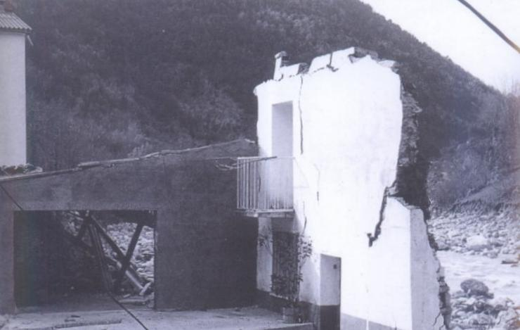 Aiguats del 1982